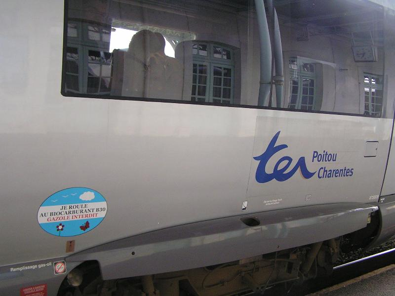 train TER Poitou-Charentes